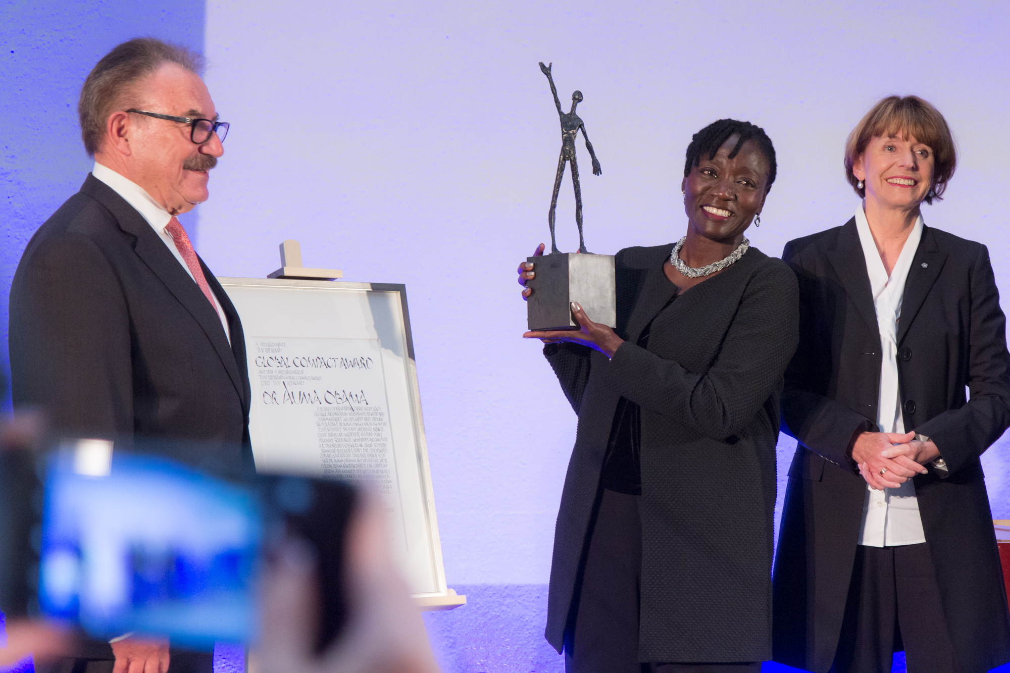 Dr. Auma Obama wird in der Piazzetta des Kölner Rathauses für Engagement für Entwicklungszusammenarbeit mit dem Internationalen TÜV Rheinland Global Compact Award geehrt. V.l.n.r.: Prof. Dr.-Ing. Bruno O. Braun, Auma Obama, Oberbürgermeisterin Henriette Reker